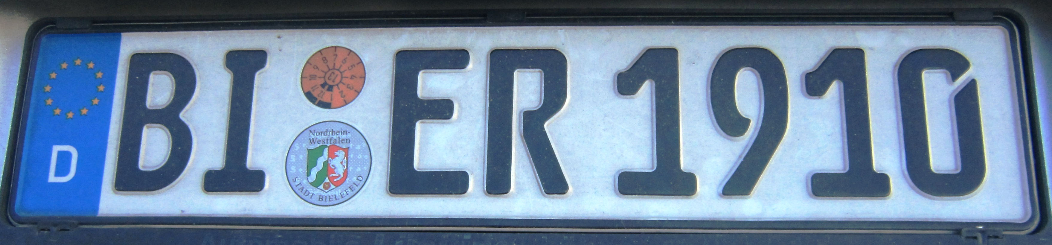 Bier kentekenplaat uit Bielefeld